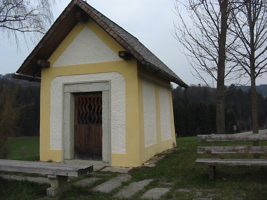 Beschreibung: Die Marienkapelle von Ensmannsreut Quelle: Penzenstadler Ludwig Datum: 4. Dezember 2009 Autor: Penzenstadler Ludwig